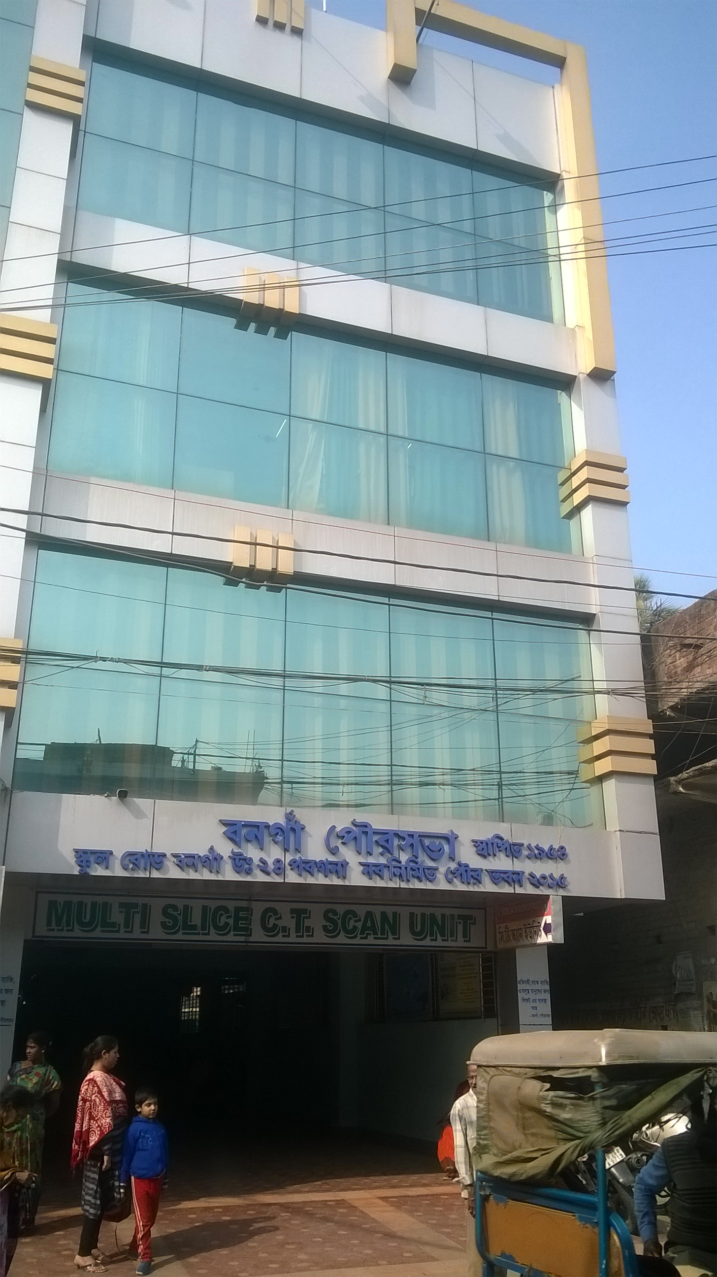 বনগাঁ পৌরসভা ভবন